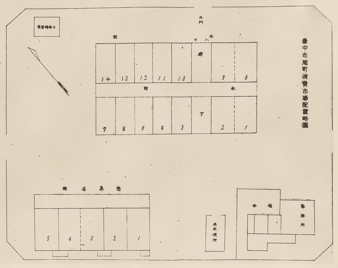 臺中市旭町消費市場為現今臺中市第五市場